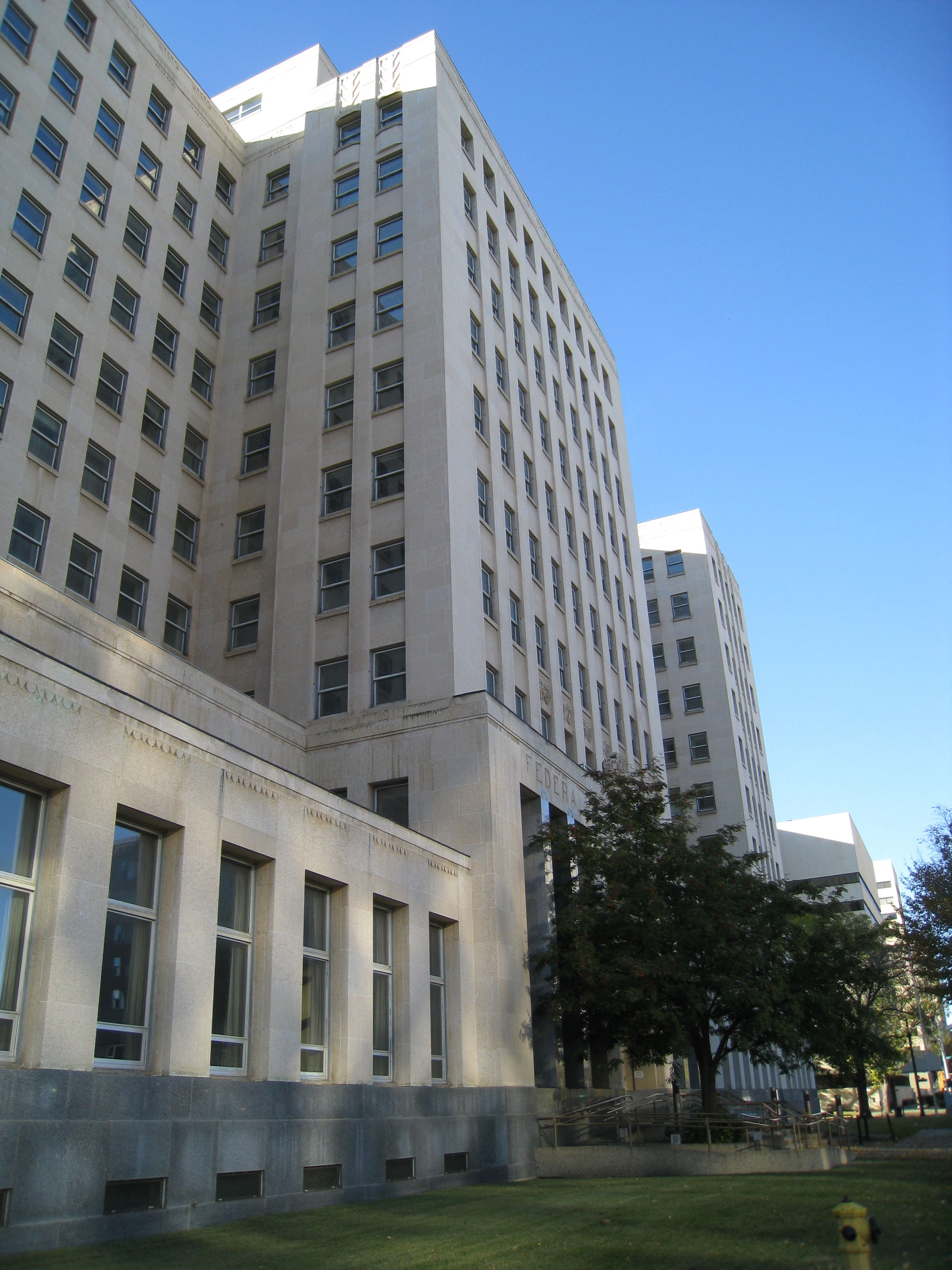 Federal Building